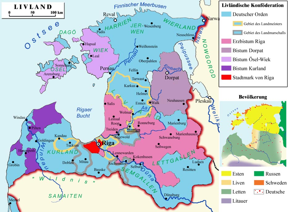 Staat des Deutschen Ordens Livländischer Staatenbund